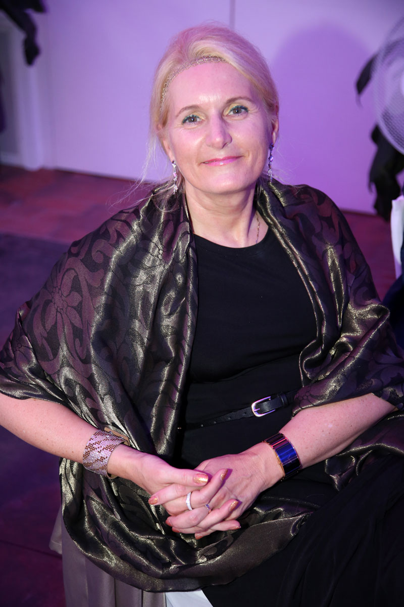 Prof. Dr. Pascale Ehrenfreund